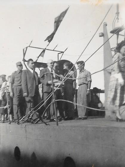 הנשיא חיים וייצמן מתקבל על סיפון אח"י וג'ווד.